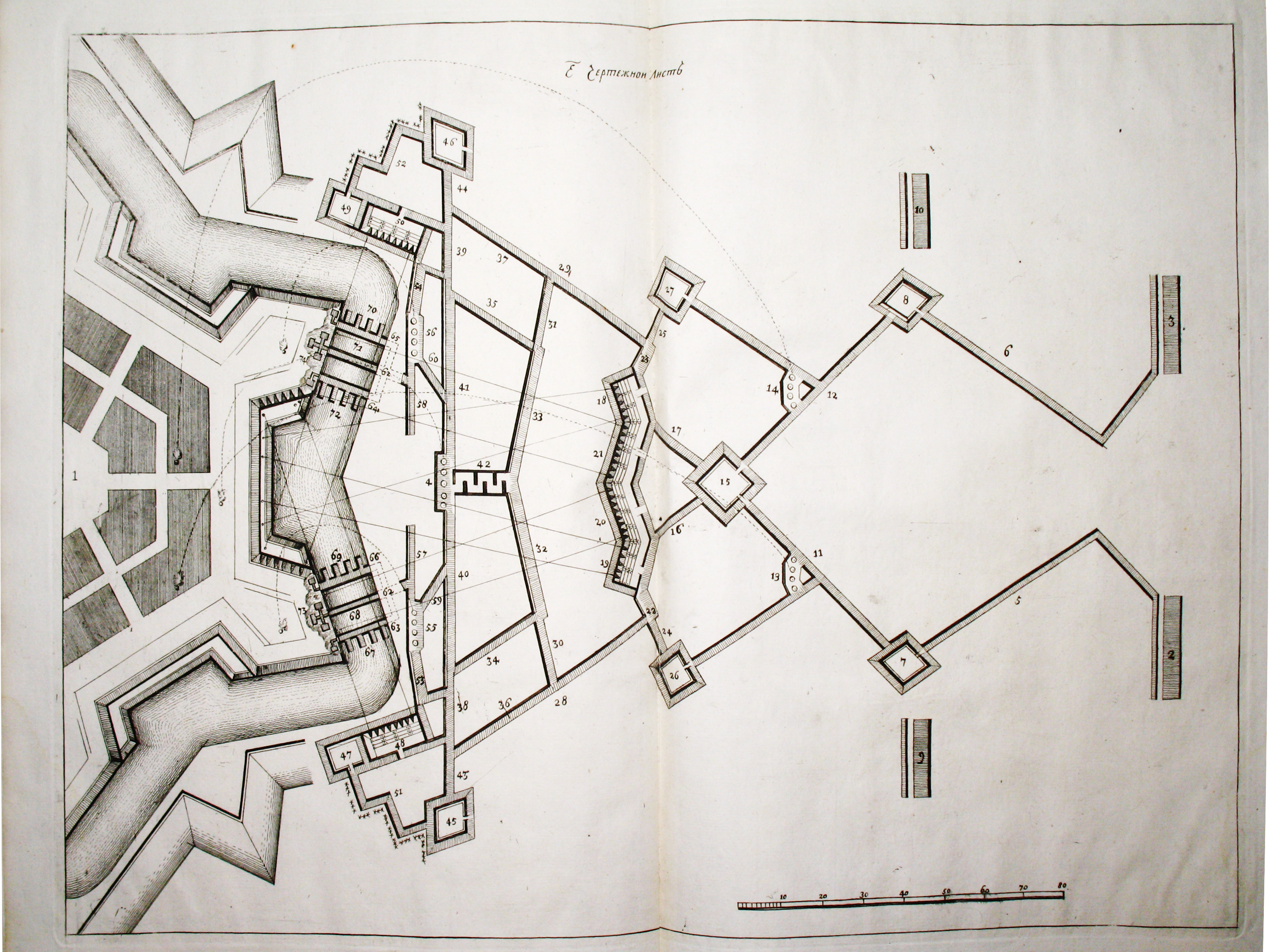 Креслення з видання: Боргсдорф, фон А.-Э.Ф. Поверенные воинские правила, како неприятельские крепости силою брати его царскому величеству к предбудущей славе изображены : чрез Ериста Фриддериха барона, фон Боргсдорфа, Цесарского Величества Римского, учрежденного началного инженера в лето Господне, 1697. Ныне же повелением Его Царского Пресветлого Величества напечатася в царствующем великом граде Москве, лета ... 1709 / Боргсдорф, фон А.-Э.Ф . - Москва : [б.и.], 1709. – 37 с. : 6 л. черт.